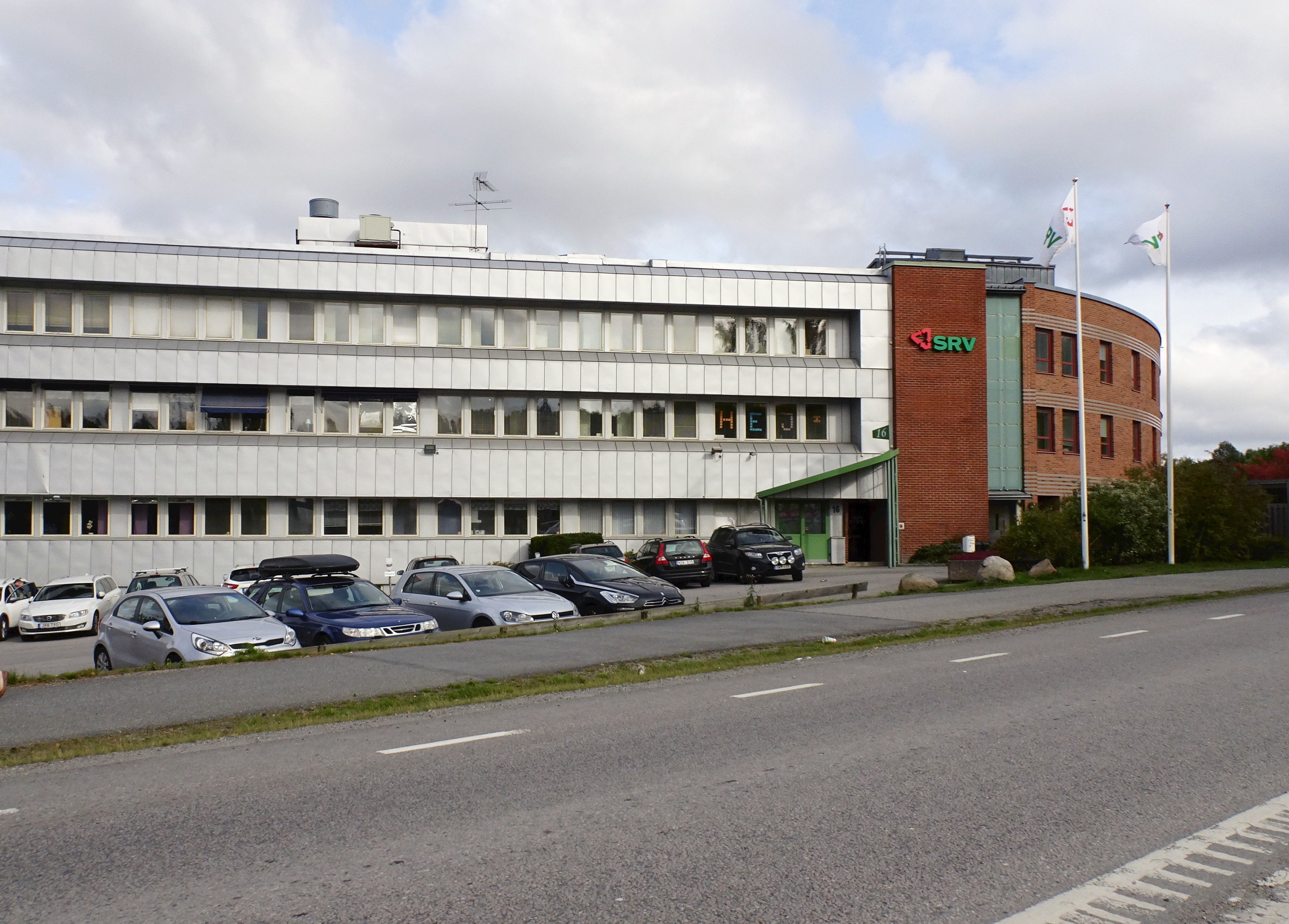 SRV:s huvudkontor, Huddinge